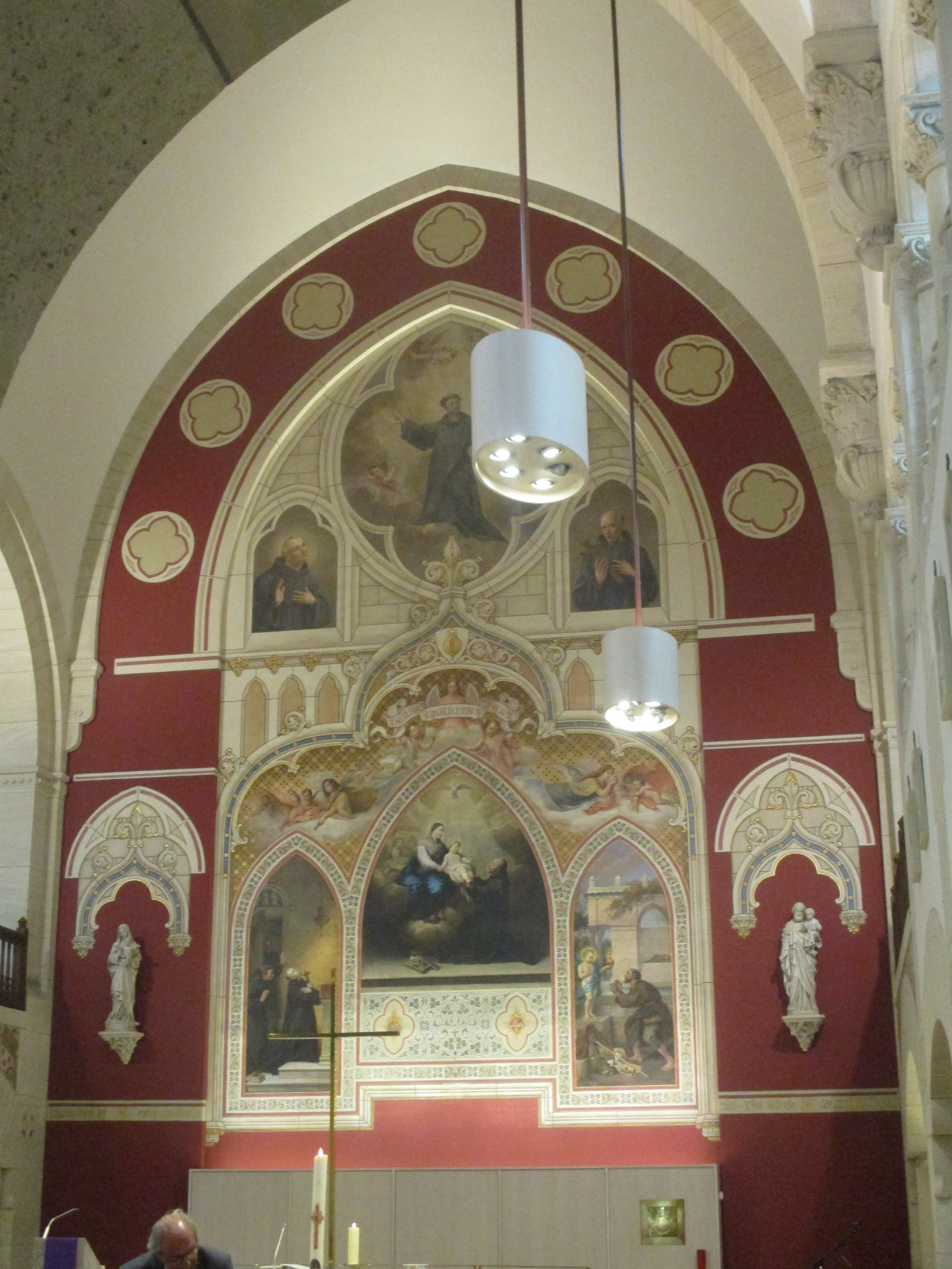 Intérieur de la chapelle Saint-Jean-de-Dieu à Paris XVe. Tableaux de Coubertin (1879).